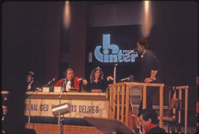 L'émission en direct sur la station France Inter invite l'acteur Patrick Dewaere à se soumettre à un procès humoristique